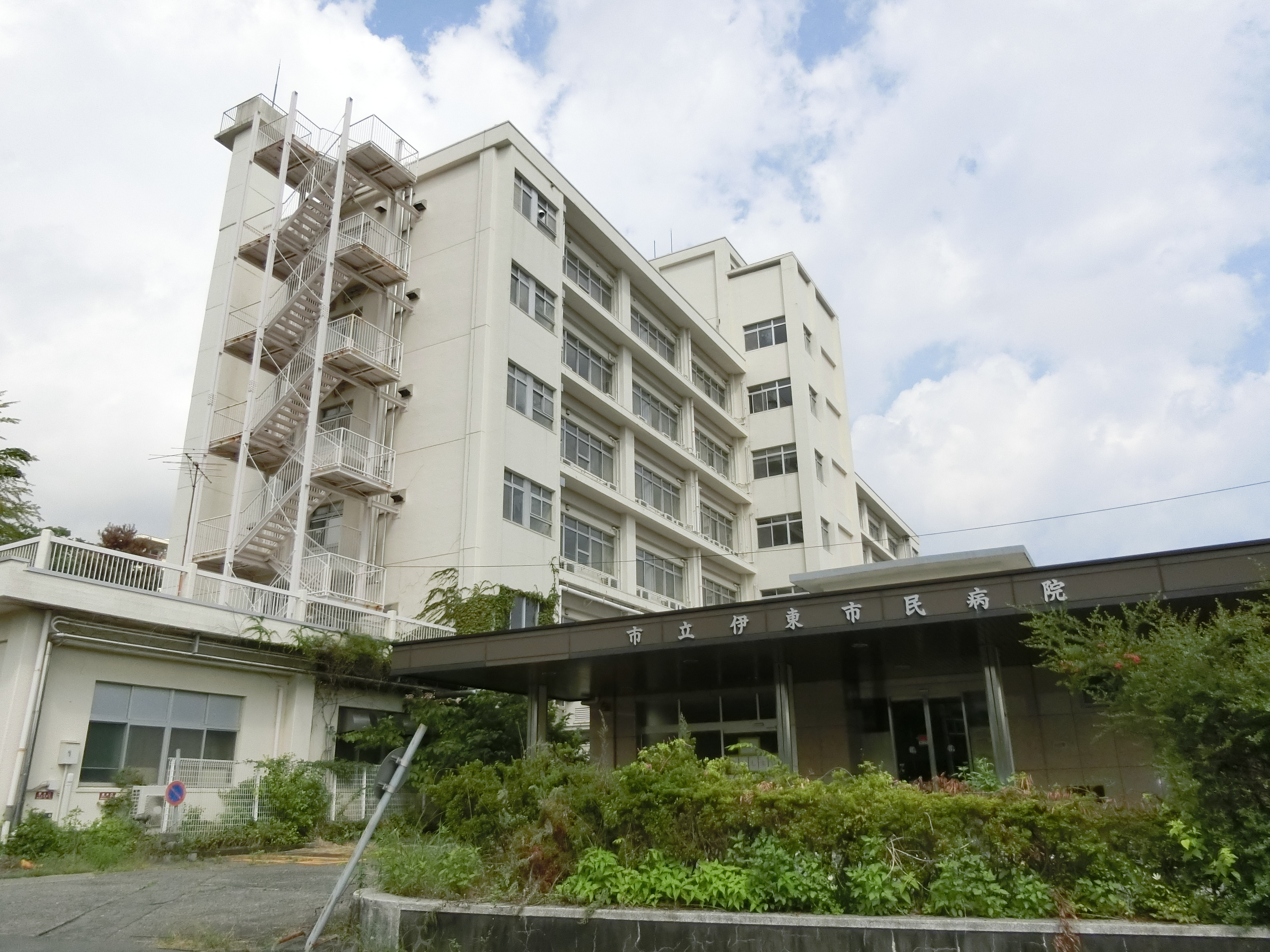 2015（平成27年）9月 撮影